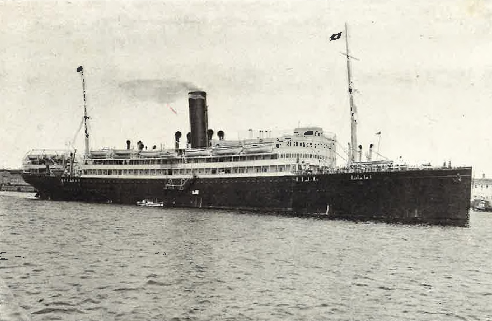 Vapor Reina Victoria Eugenia (1914).